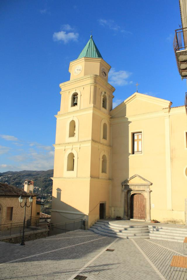 Chiesa Madre Viggianello